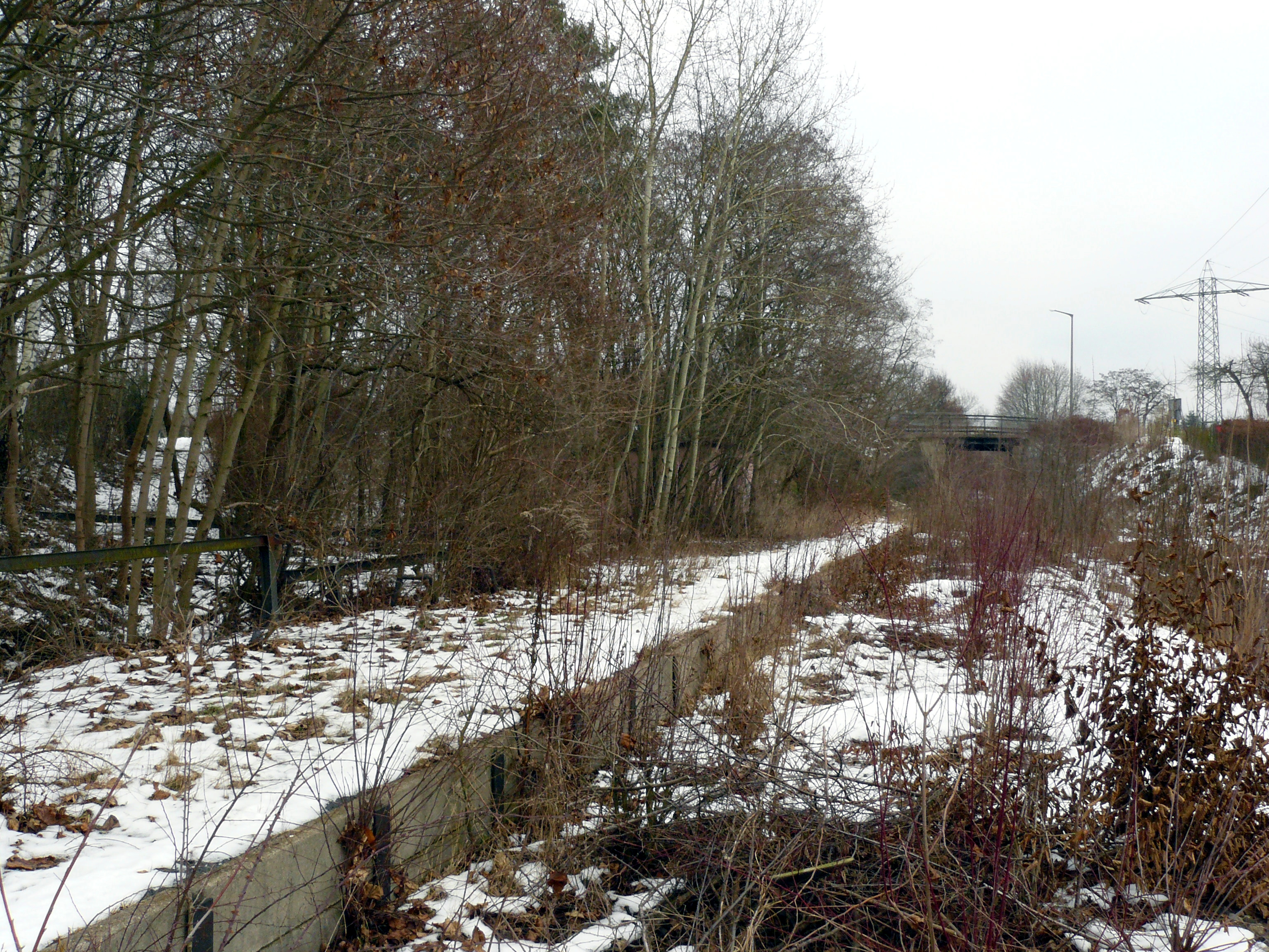 Haltepunkt Fürth Süd in Blickrichtung Südosten an der ehemaligen Bibertbahn 49°26′11″N 10°59′38″E / 49.43639392063345°N 10.993873178958893°E